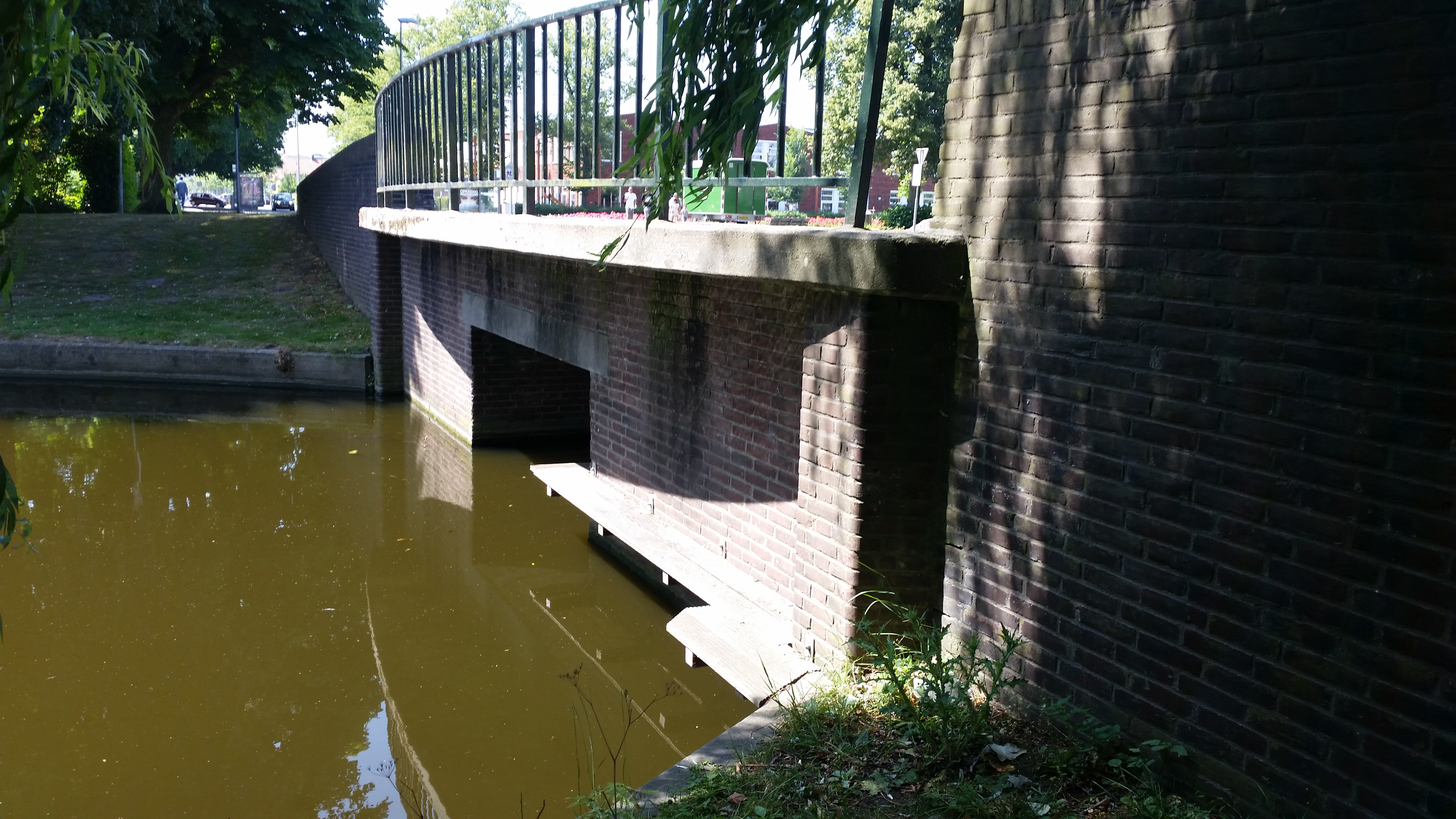 Brug 622, Hannah Arendtbrug in De Savornin Lohmanstraat, Amsterdam, overspanning met balkon